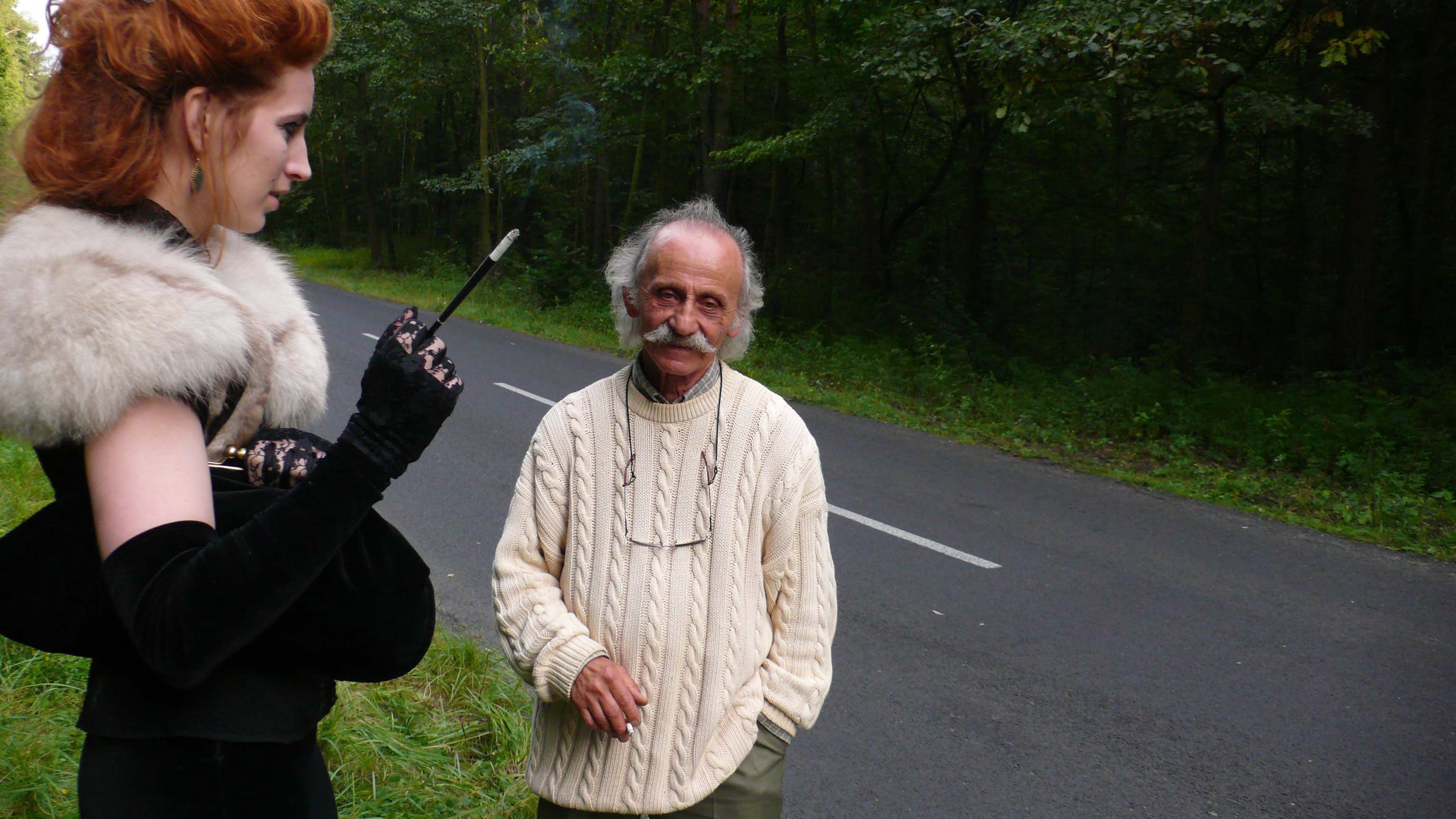 דון קישוט בארץ הפלאות